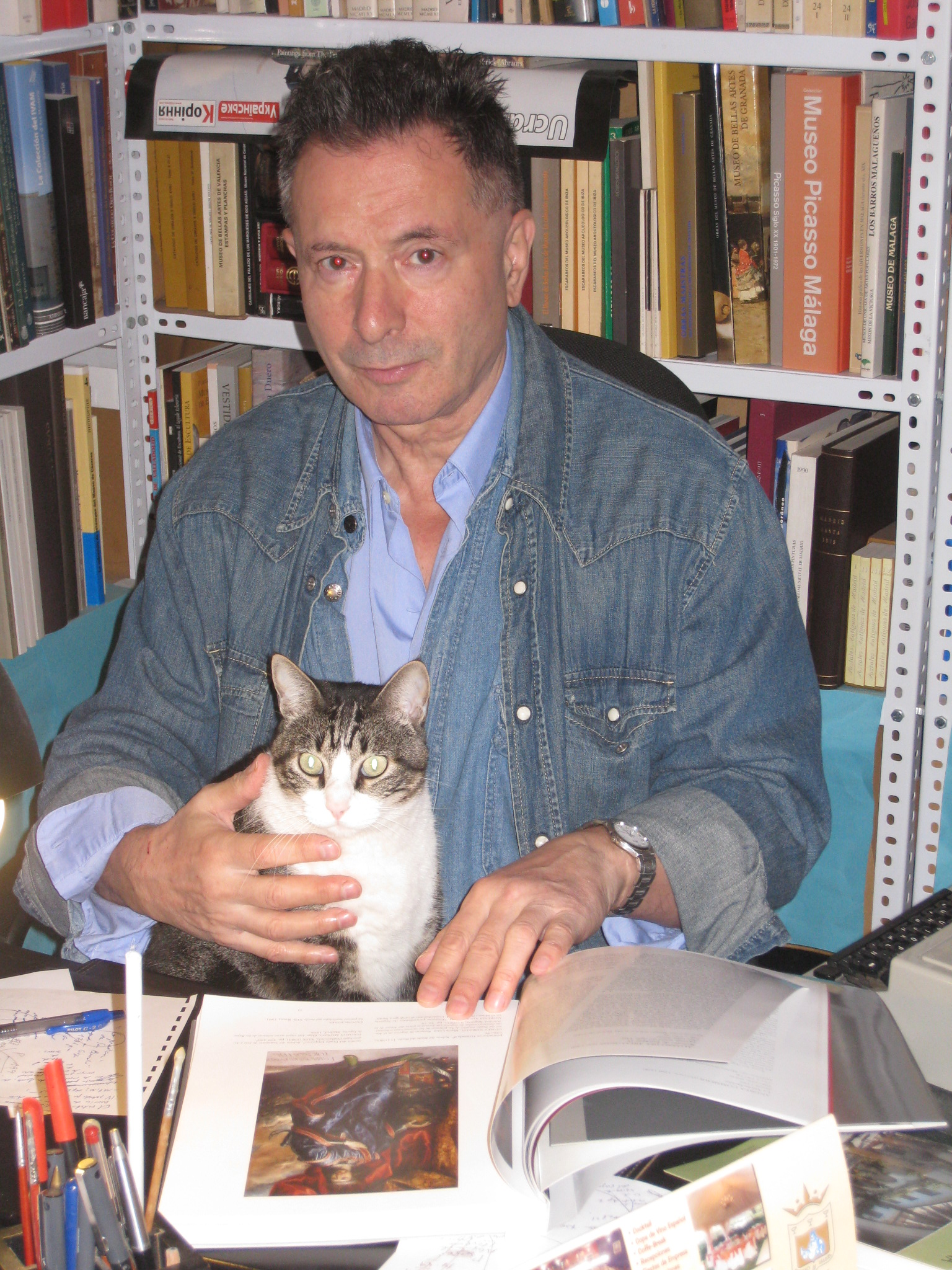 En el despacho de trabajo en su casa de Málaga